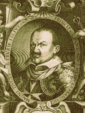 Don Antonio de' Medici -- Princeps Antonius Medices Francisci Magni Ducis Etruriæ Filius, engraved frontispiece, xvii century engraving.